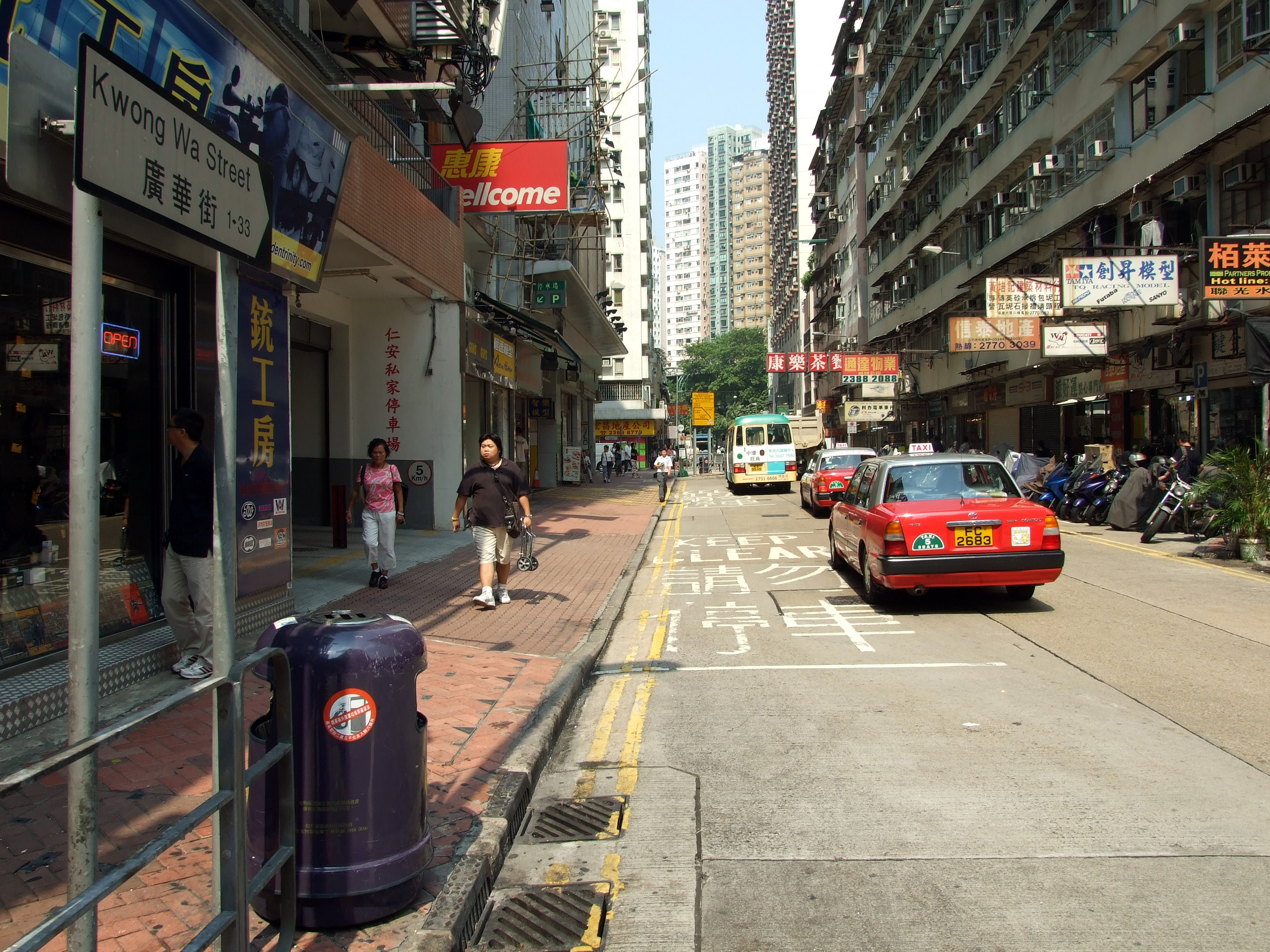 中文（香港）: 廣華街